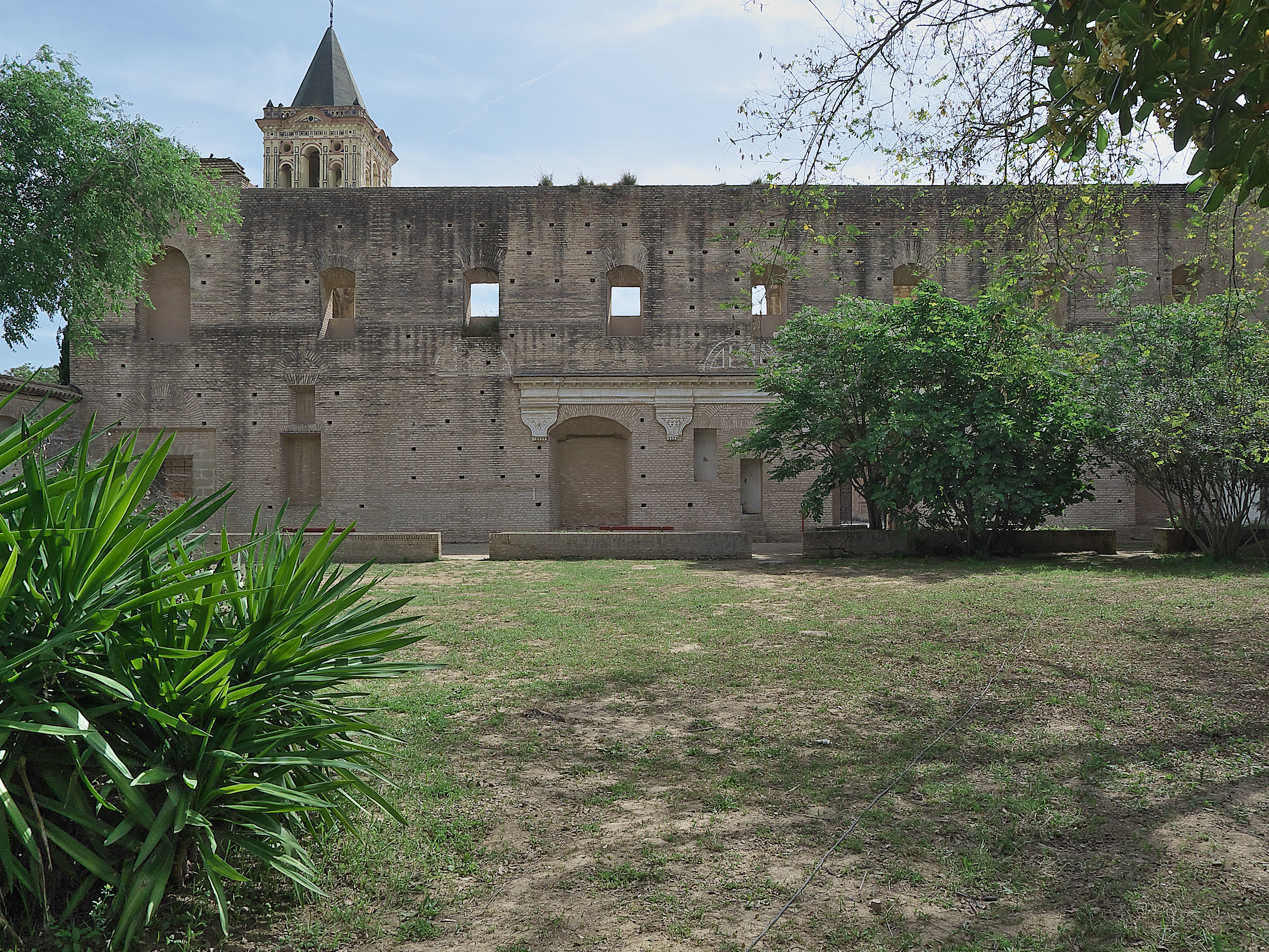 Las necesidades del monasterio obligaron a adaptar un segundo refectorio en la zona lindante con el muro de poniente del claustro principal.